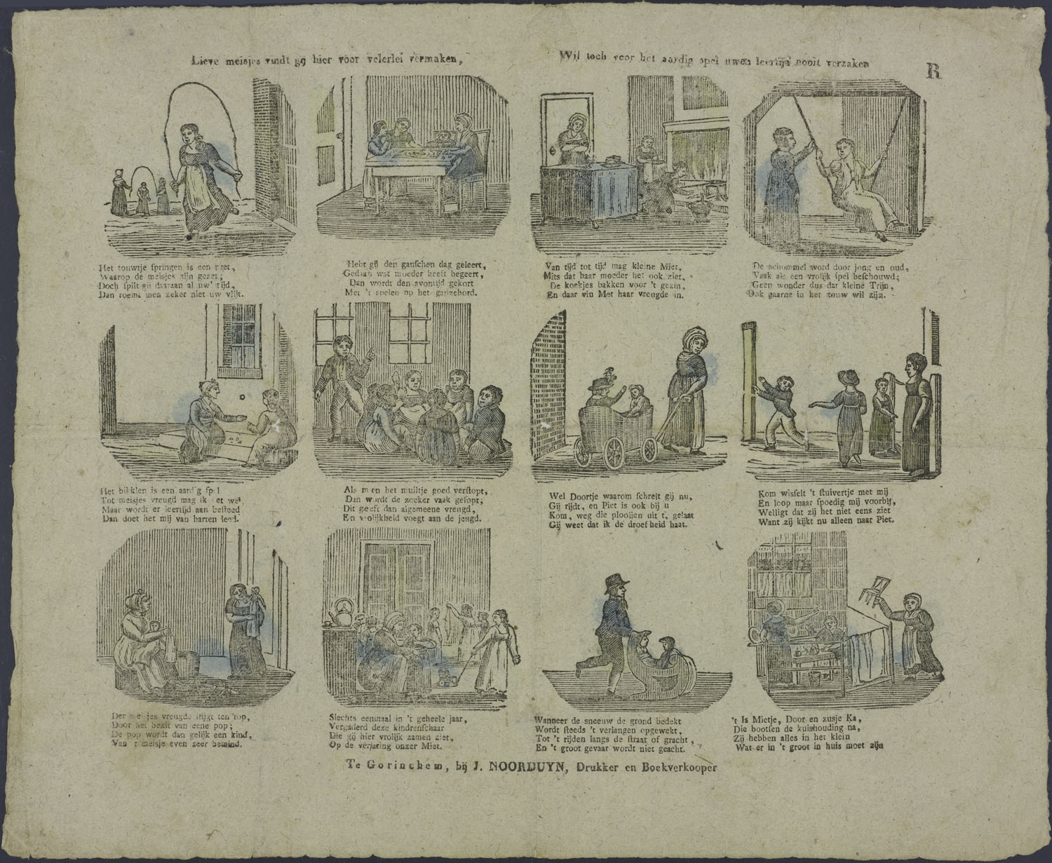 Oblong centsprent met 3 x 4 niet omkaderde houtsneden, met afbeeldingen van meisjes bij hun spel: touwtje springen, spelen met een ganzebord, koekjes bakken, schommelen, bikkelen, een muiltje verstoppen, wandelen met een poppenwagen, stuivertje (boompje) verwisselen, met de pop spelen, een verjaardagsfeest, sleetje rijden, het huishouden nabootsen. Bevat vierregelige rijmende onderschriften.